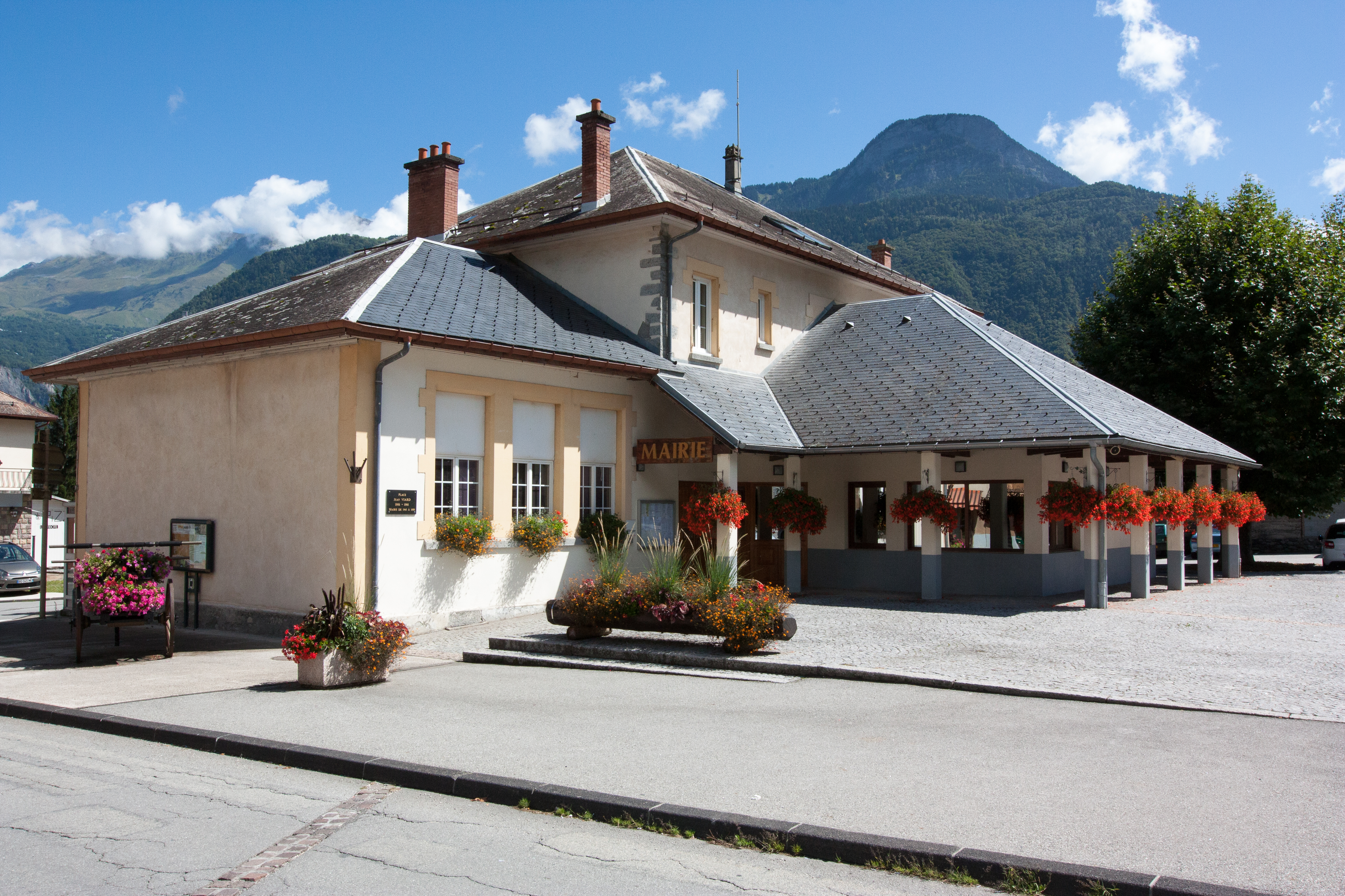 Mairie de Saint-Étienne-de-Cuines / Saint-Étienne-de-Cuines / Savoie / France